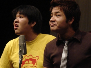 しゃもじ、沖縄